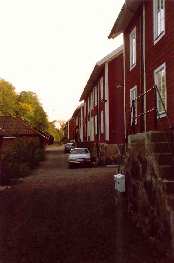 Motala verkstad, en bild tagen av Harri Blomberg i september 1992.